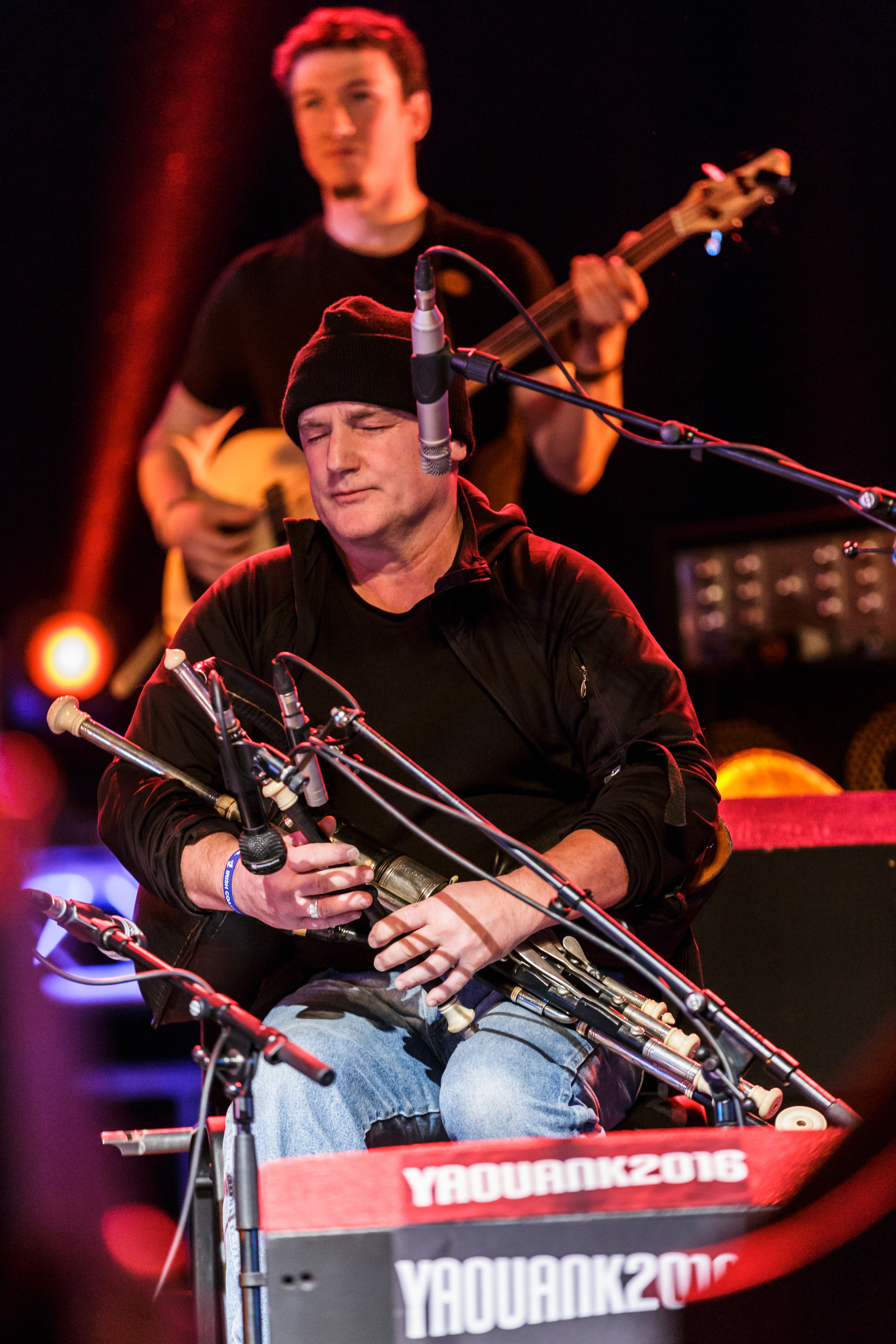 Création "Yoann An Nedeleg Noz Project" avec Davy Spillane en fest-noz lors du festival Yaouank le 19 novembre 2016 au MusikHall du Parc Expo de Rennes.